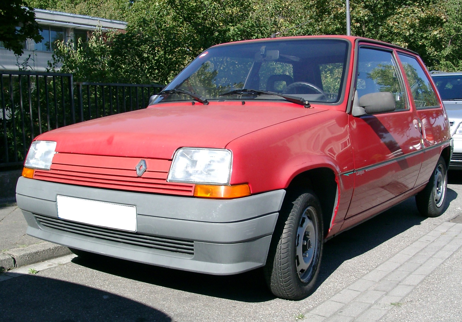 Renault 5